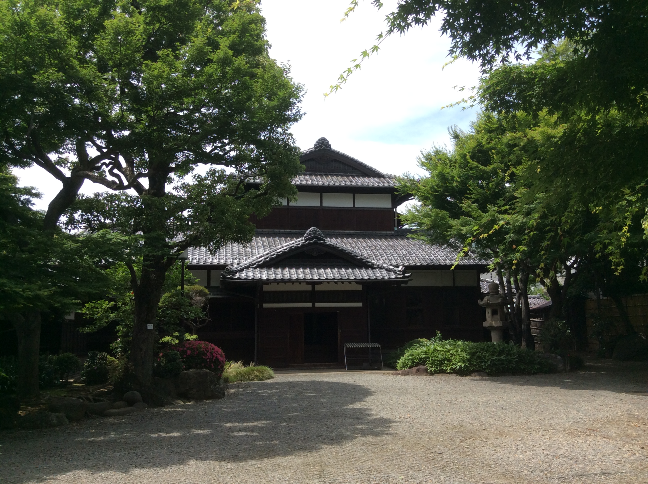 （2015年5月22日撮影）